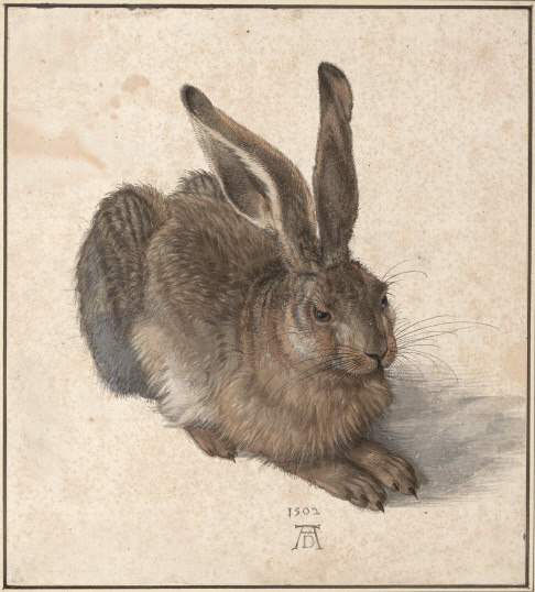 Le Lièvre aquarelle et gouache sur papier 25,,1 x 22,6 cm En bas , le monogramme de l'artiste au dessus la date, 1502 Albertina, Vienne